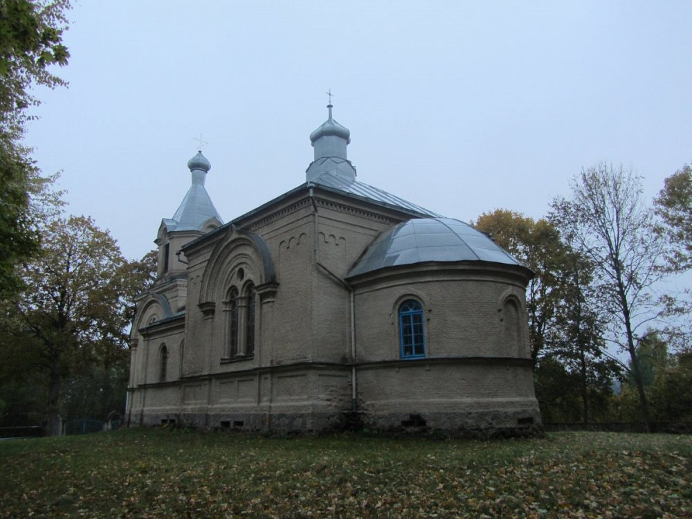 Ятвеск. Царква Пакрова Прасвятой Багародзіцы